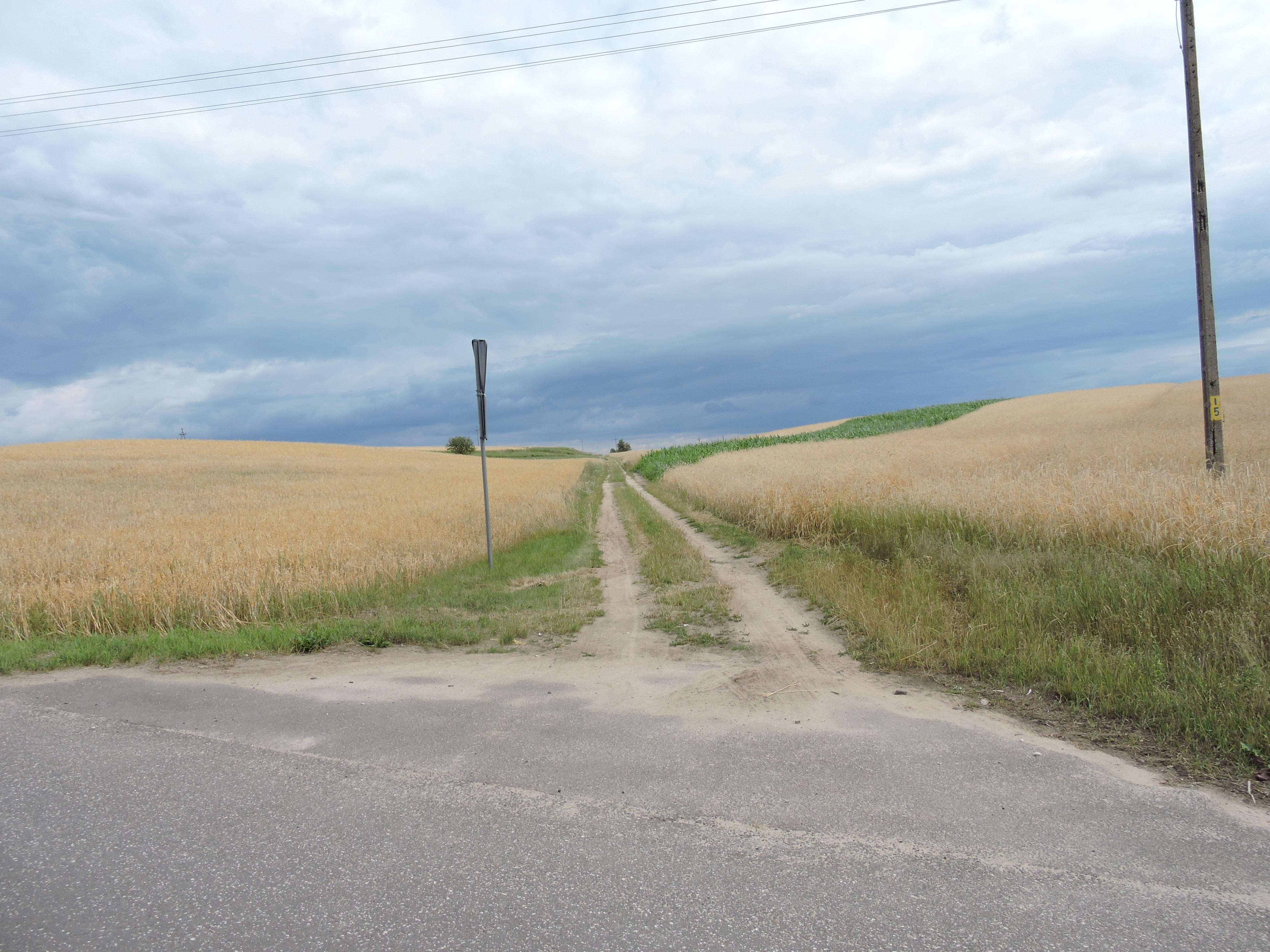 Droga powiatowa 3213P we wsi Kramsk-Łazy